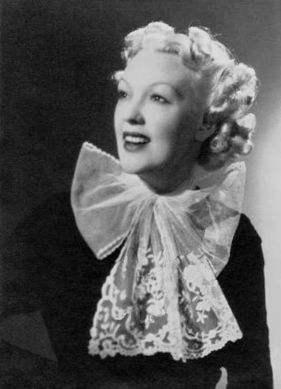 Jeanne Aubert (1900-1988), portrait en noir et blanc de 1926